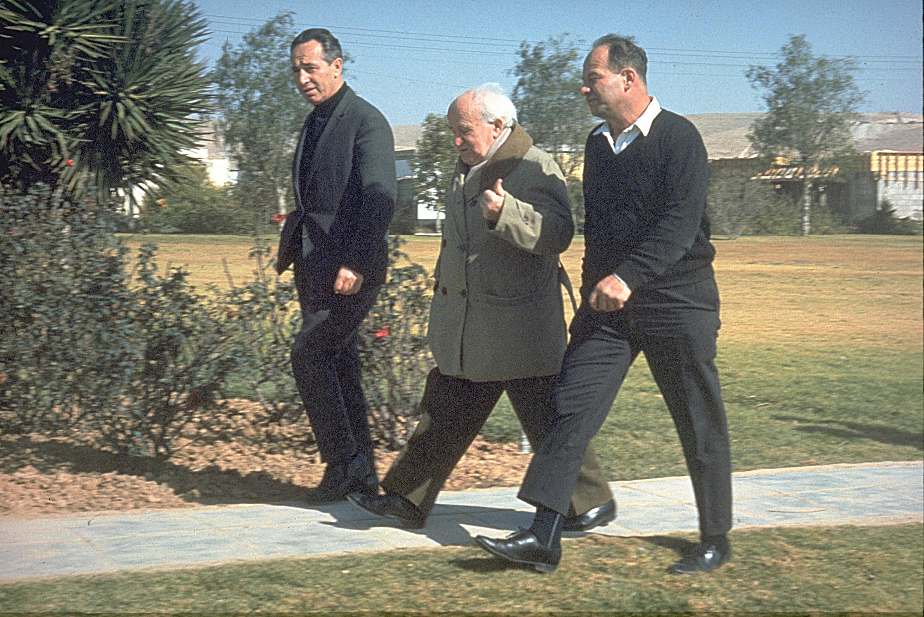 David Ben Gurion, center, on his daily walk in Kibbutz Sde Boker. Shimon Peres on the left. Photograph: GPO. 01/03/1969 דוד בן גוריון בטיולו הרגלי היומי בקיבוץ שדה בוקר בנגב. משמאל שמעון פרס.